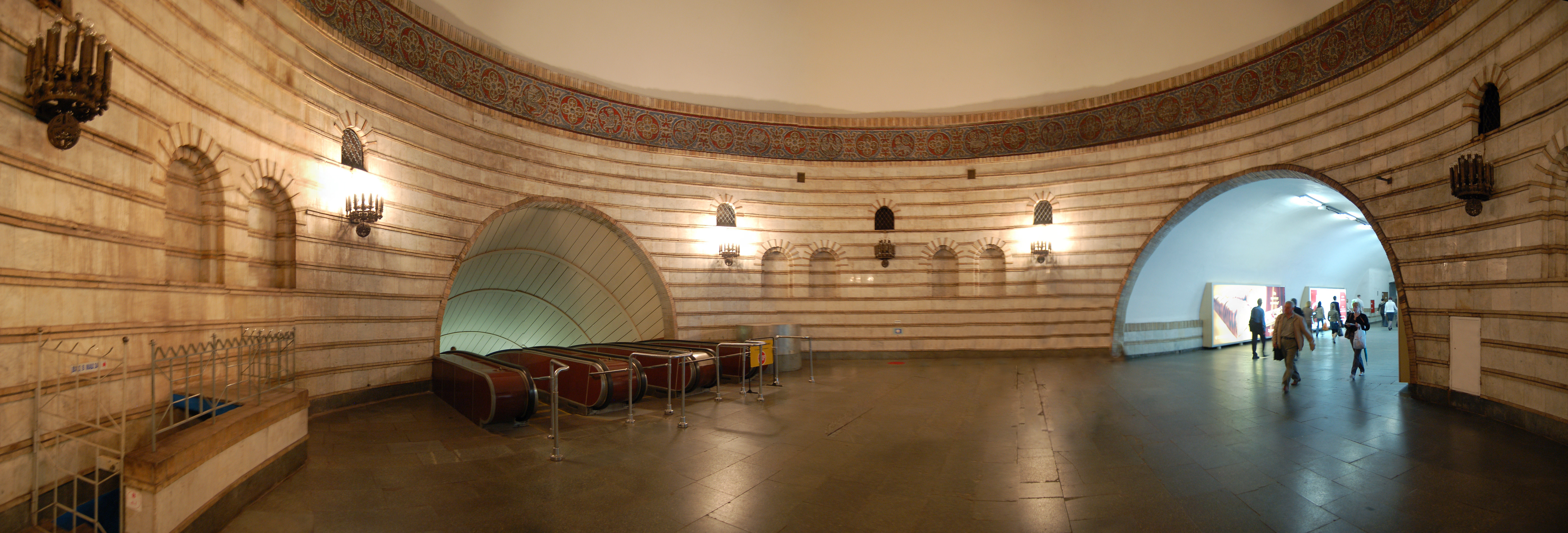 Cтанция метро «Золотые ворота», панорама промежуточного вестибюля эскалаторного наклона